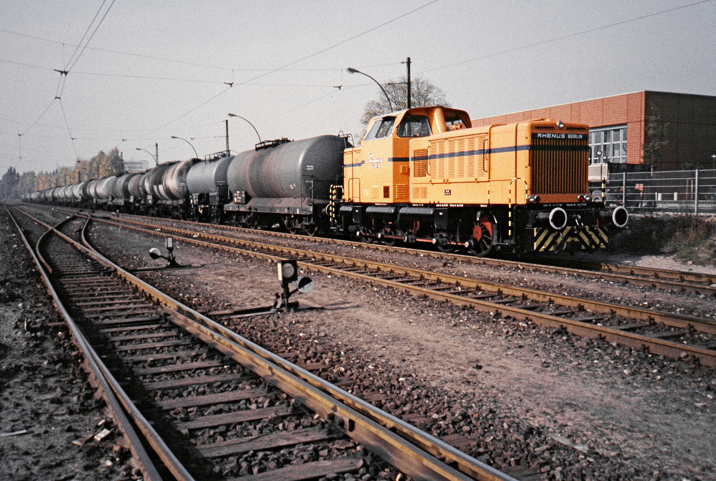 Bahnhof Nonnendammallee Berlin mit Rhenus Lok 2